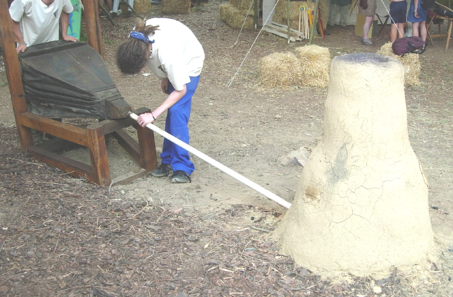 Inbetriebnahme eines Keltischen Rennofens zur Eisengewinnung; Ausstellung auf dem Internationalen Keltenfest "CELTOI 2006" in Nonnweiler-Otzenhausen (Deutschland).